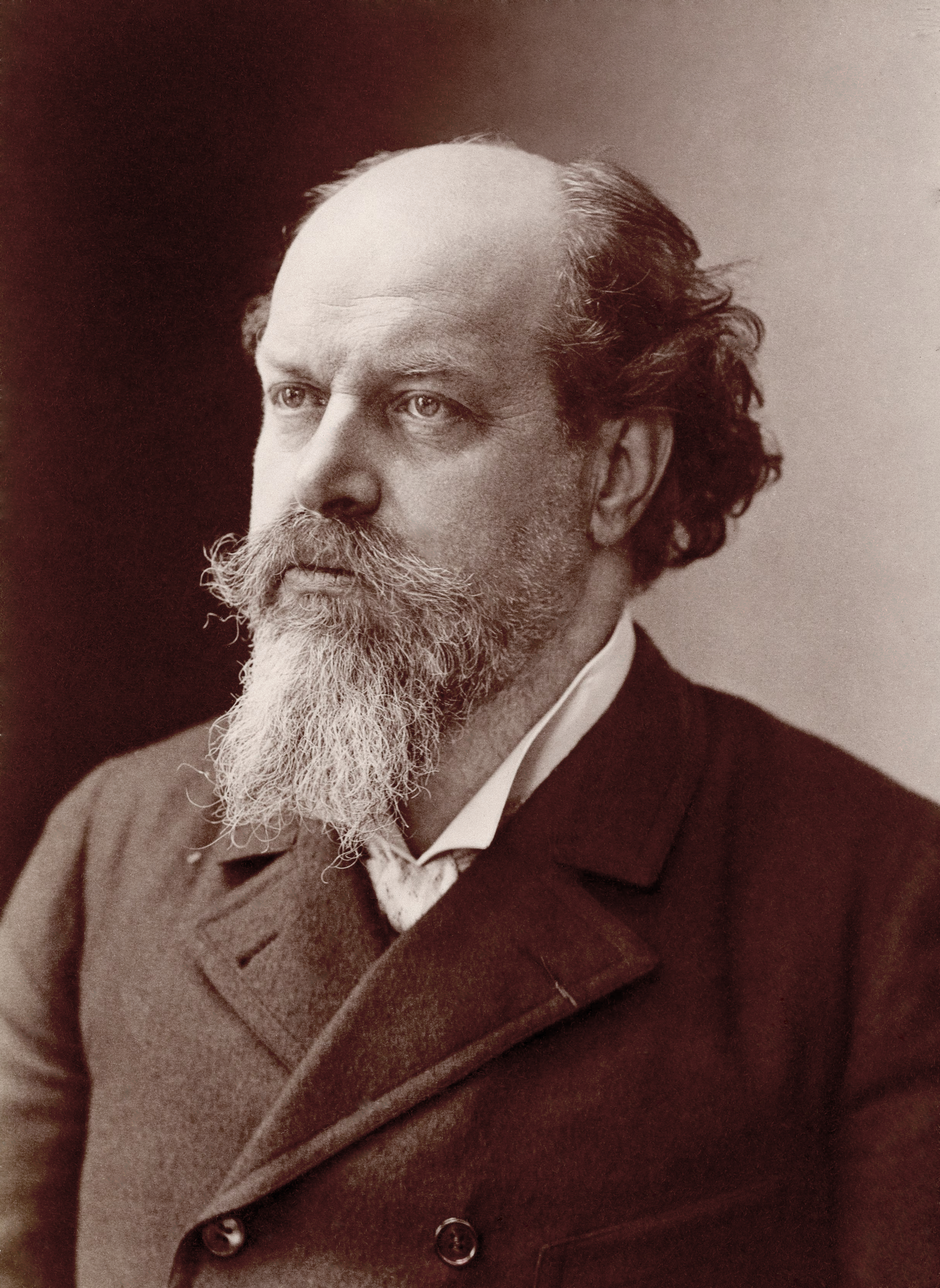 Louis Gallet (1835 - 1898), librettiste et auteur dramatique français. Directeur de l'hôpital Lariboisière